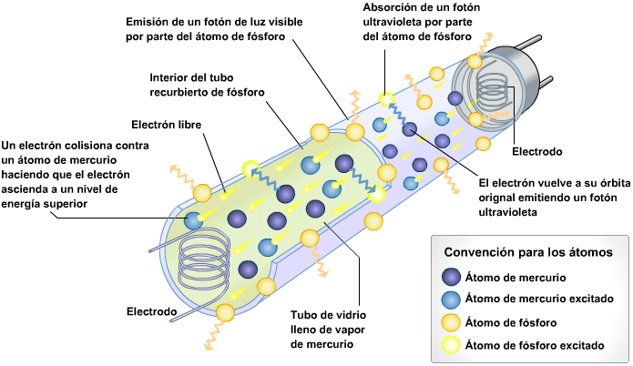 Funcionamiento de un tubo de luz fluorescente.